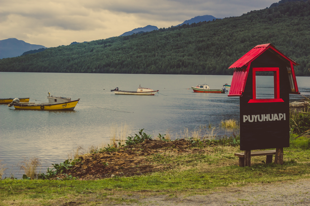 Plaza de Puyuhuapi, 2013